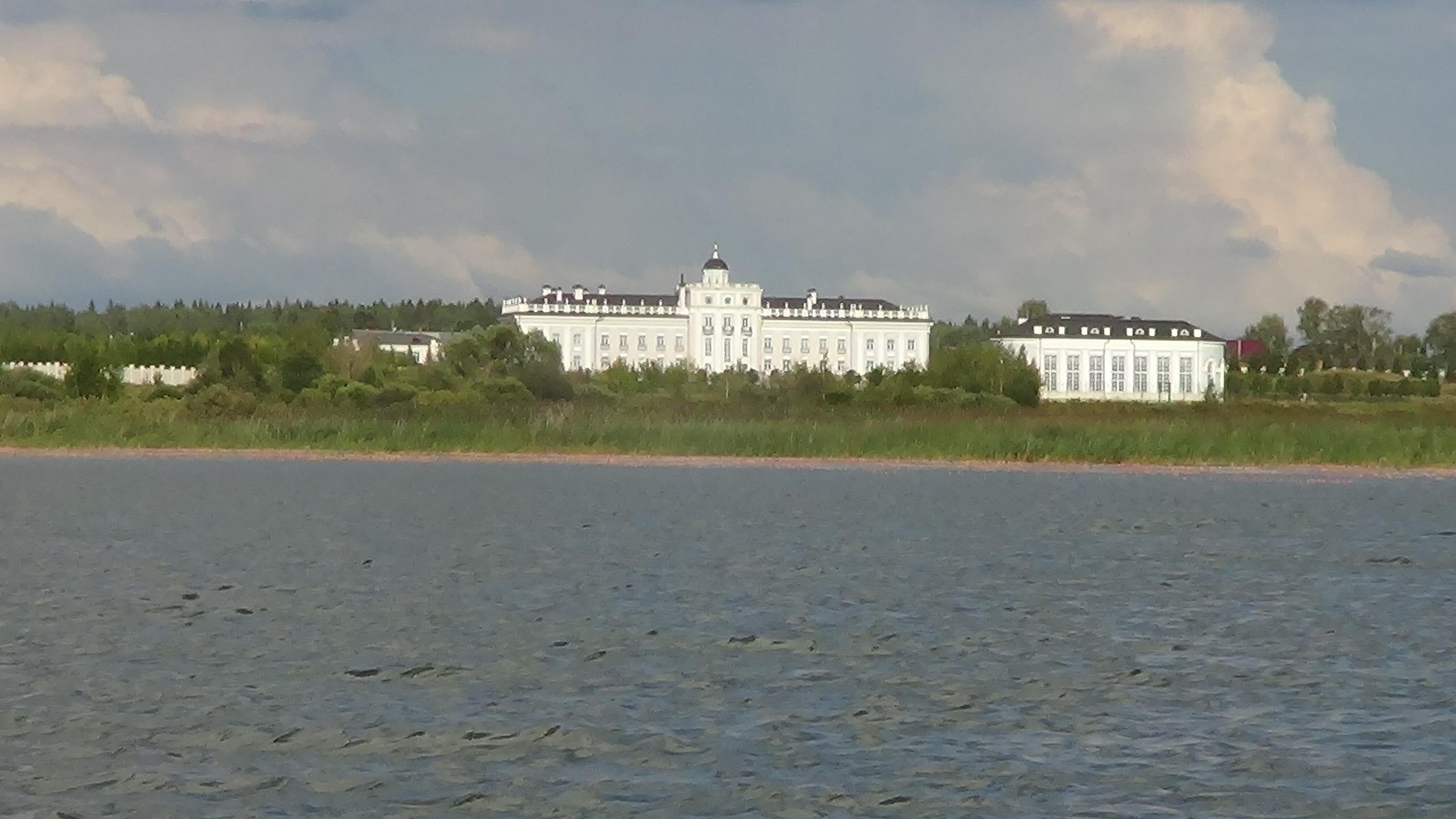 Резиденция на Истринском водохранилище